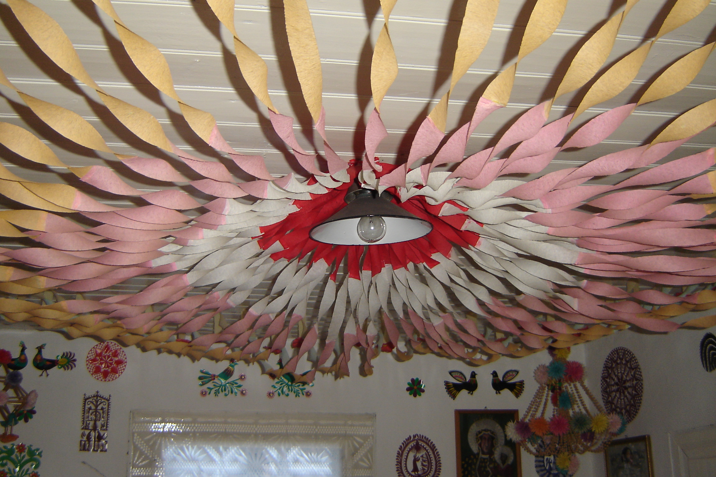 Chata kurpiowska - pająk